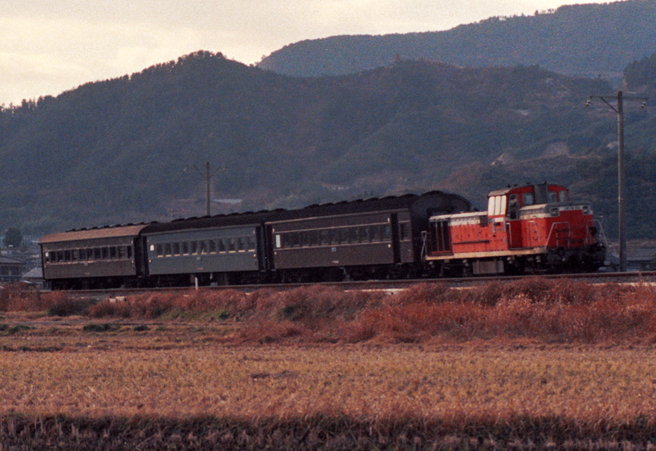 臨時急行「いよ52号」（機関車DE10の次がオハフ61）